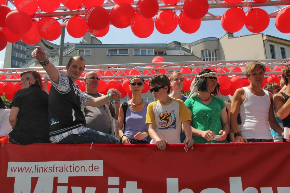 700.000 Lesben, Schwule und Andere feierten am vergangenen Samstag ausgelassen auf dem CSD in Berlin. Auch DIE LINKE war mit einem eigenen Truck präsent. DJ Marro und Gloria Viagra baten hier zum Tanz. Mit den Linken Bundestagsabgeordneten Petra Pau, Caren Lay, Barbara Höll und Halina Wawcyniak wurde Flagge gezeigt für Freiheit und Gleichheit. Auf dem deutlich politischen CSD wurde gegen Diskriminierungen im Wissenschaftsbereich und die aktuelle Situation in Russland, wo Homo-und Transsexualität mit Hilfe des Strafrechts unsichtbar gemacht werden soll.